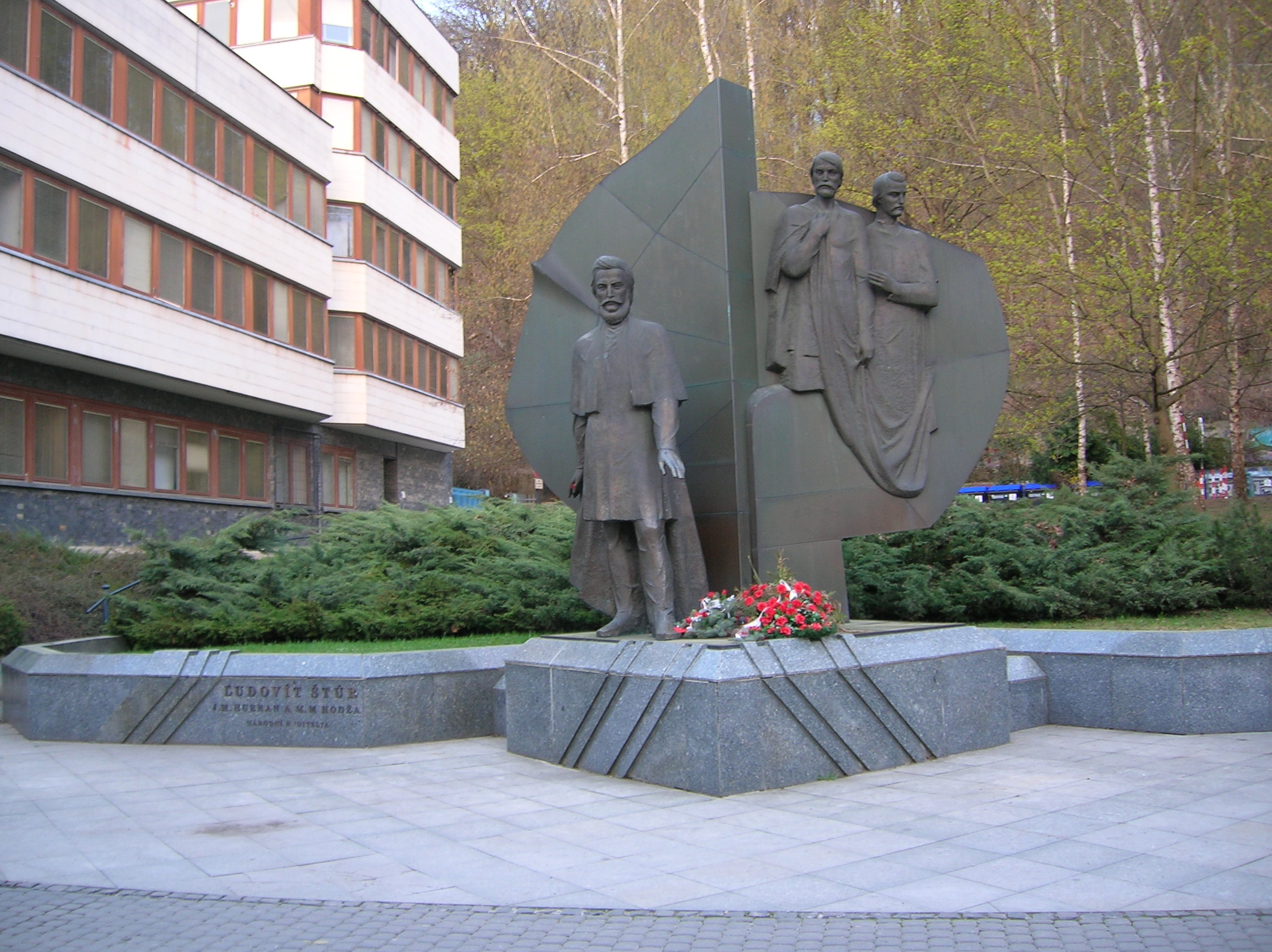 Pamätník národných buditeľov. Na mramorovom podstavci štylizovaný bronzový list lipy, z ktorého pravej polovice vystupujú postavy Hurbana a Hodžu. V popredí bronzová socha Ľudovíta Štúra v nadživotnej veľkosti. (28.09.1991; Akad. soch. Milan Ormandík, Ing. arch. Ivan Michalec, DrSc., Ing. arch. Miloslav Mojžiš), Trenčín, Hviezdoslavova ulica